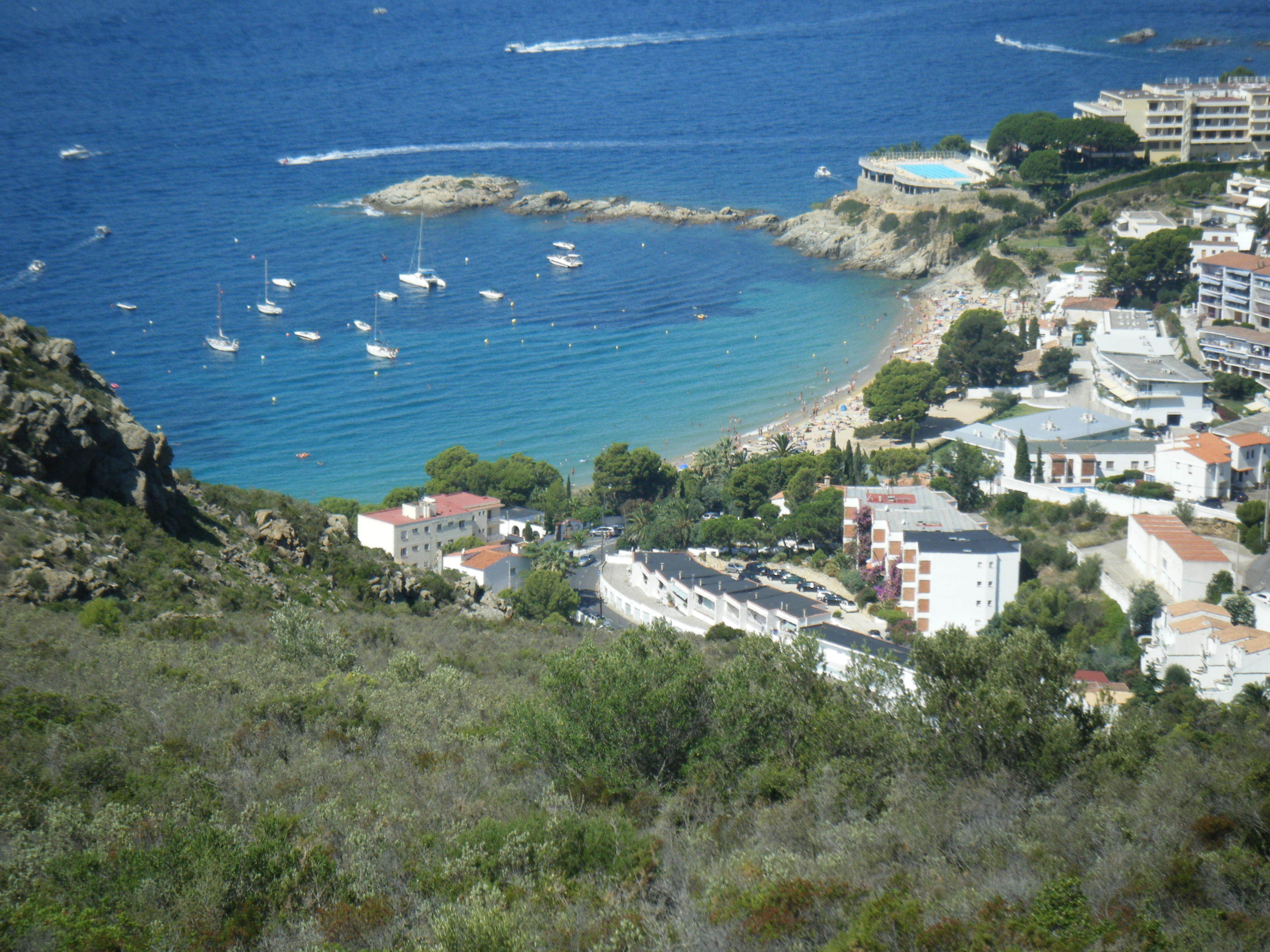 Roses This is a a photo of a beach in Catalonia, Spain, with id: PL-CT-17003-238